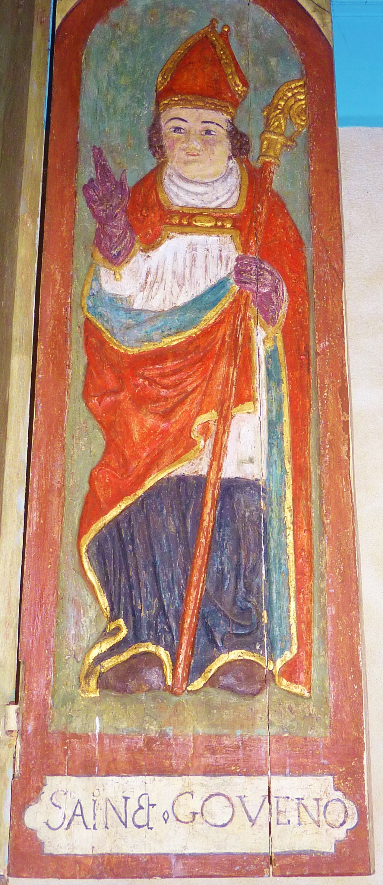 Plougastel-Daoulas : chapelle Saint-Guénolé, triptyque de saint Caradec, le panneau de saint Gouesnou